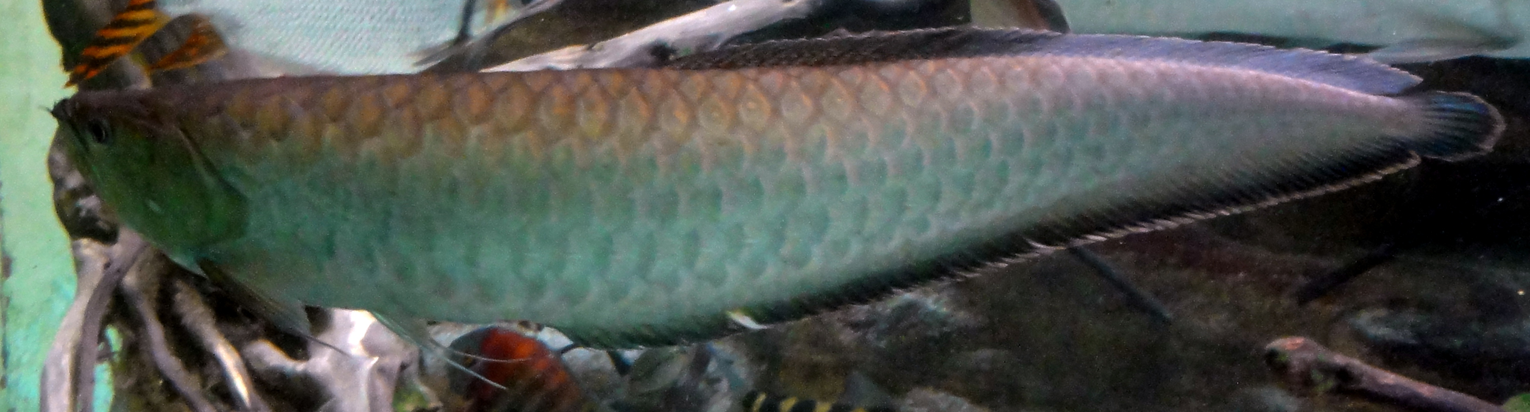 Osteoglossum ferreira